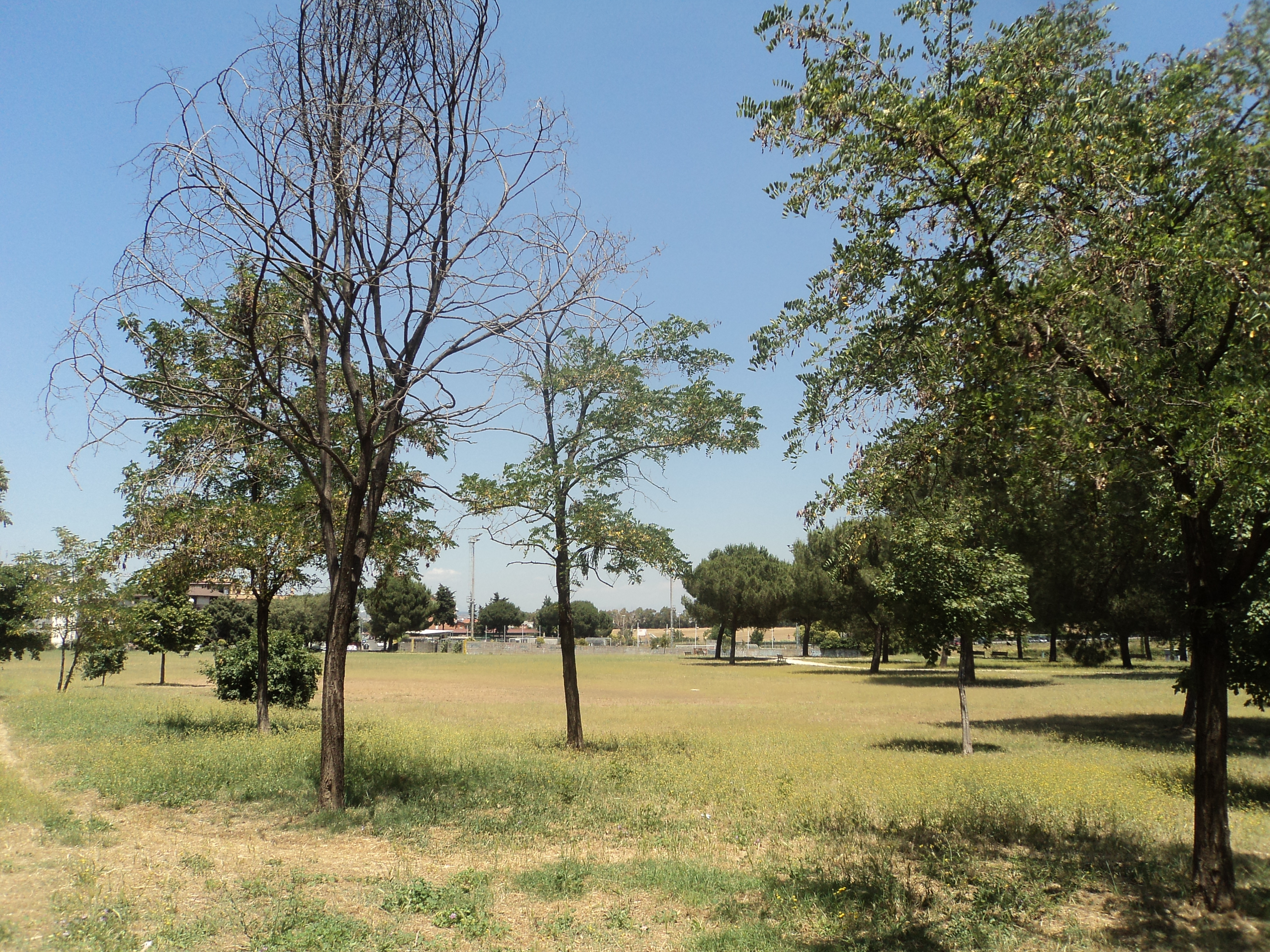 Parco Caduti di Marcinelle. Per altre foto